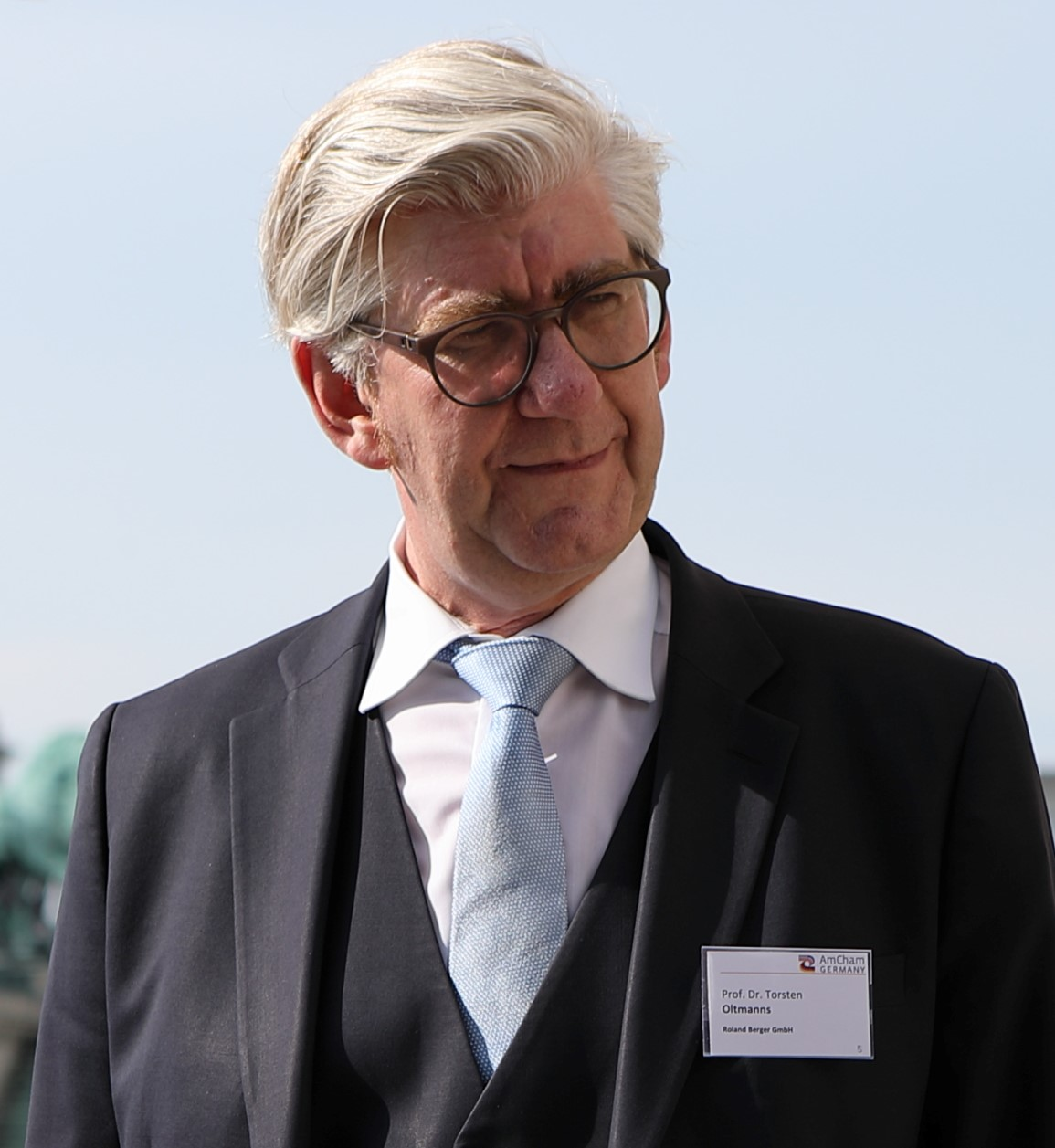 Prof. Dr. Torsten Oltmanns, June 2019